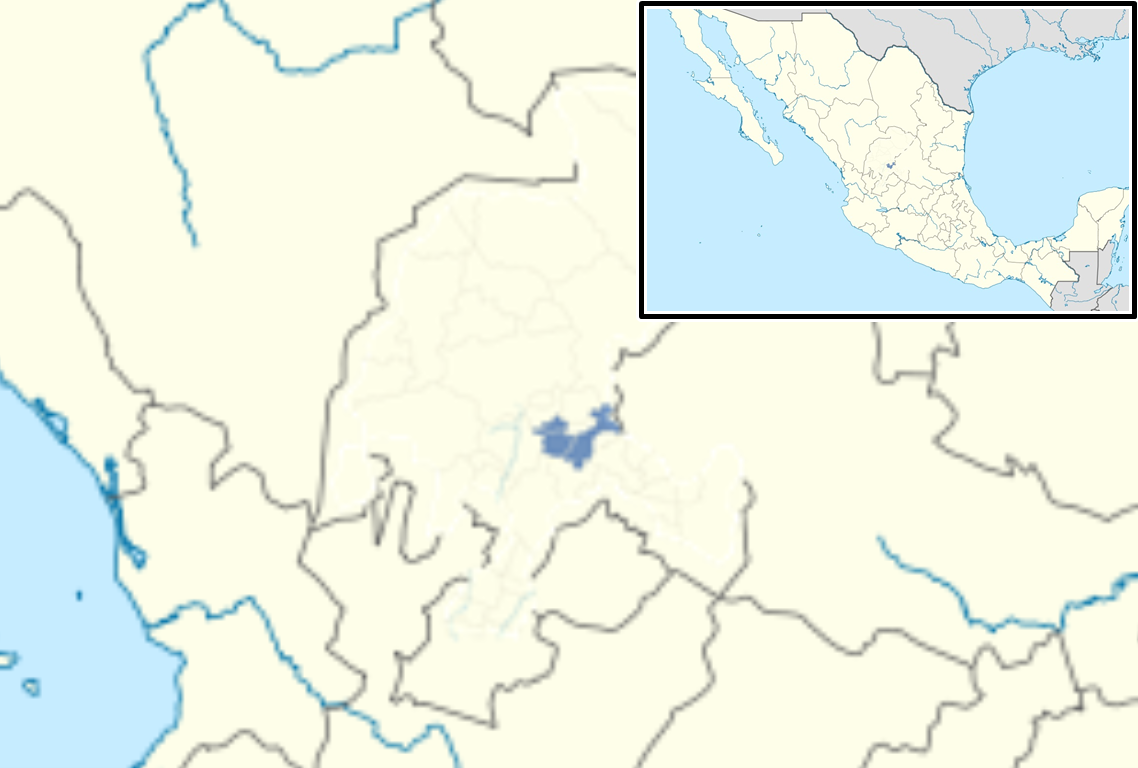 Zona Metropolitana Zacatecas-Guadalupe.